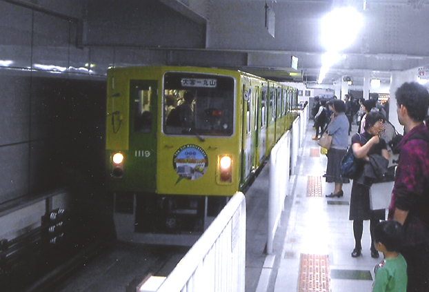 大宮駅で撮影した1010系の写真